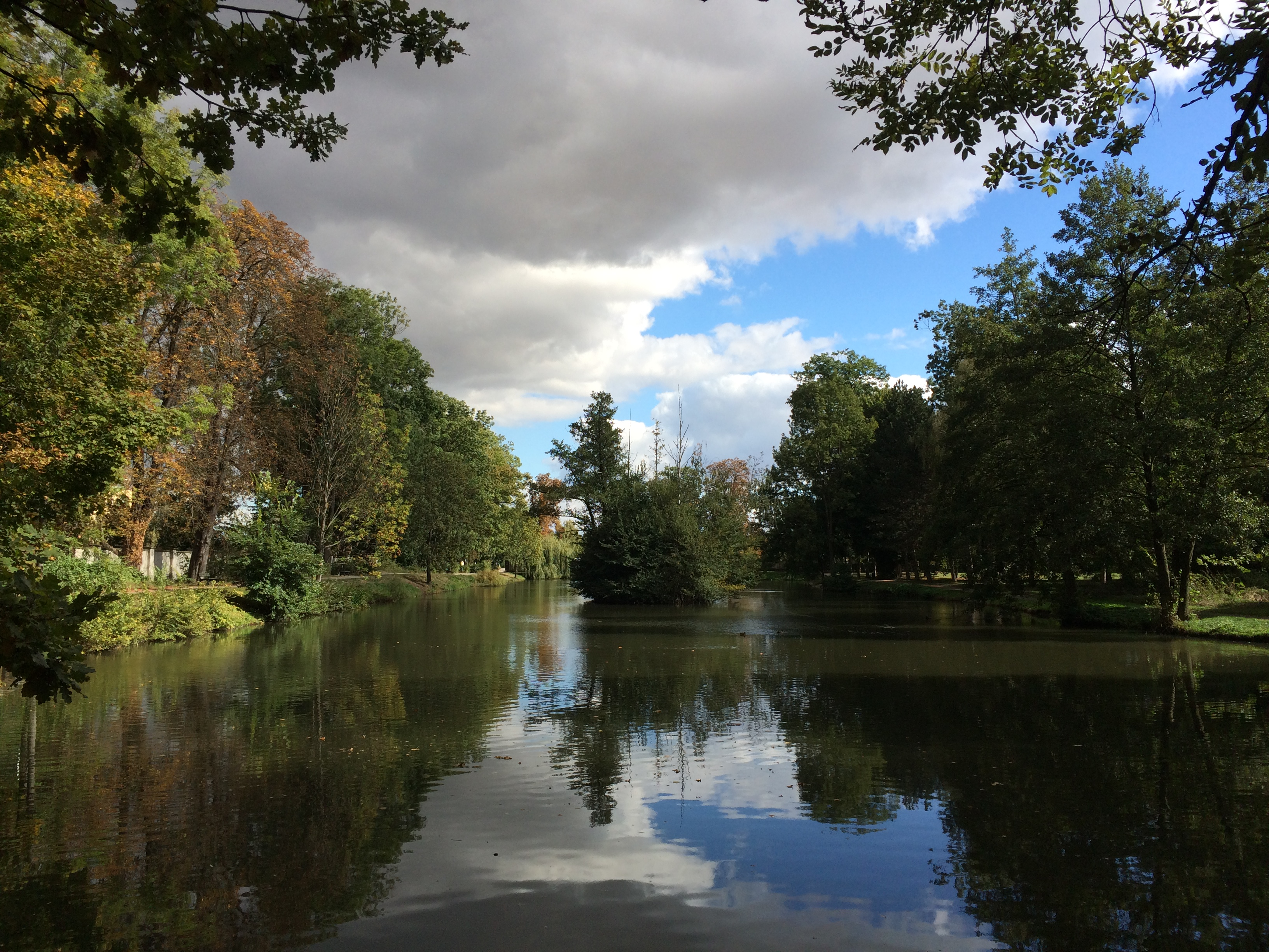 Čakovický zámecký park, rybník v severní části parku.